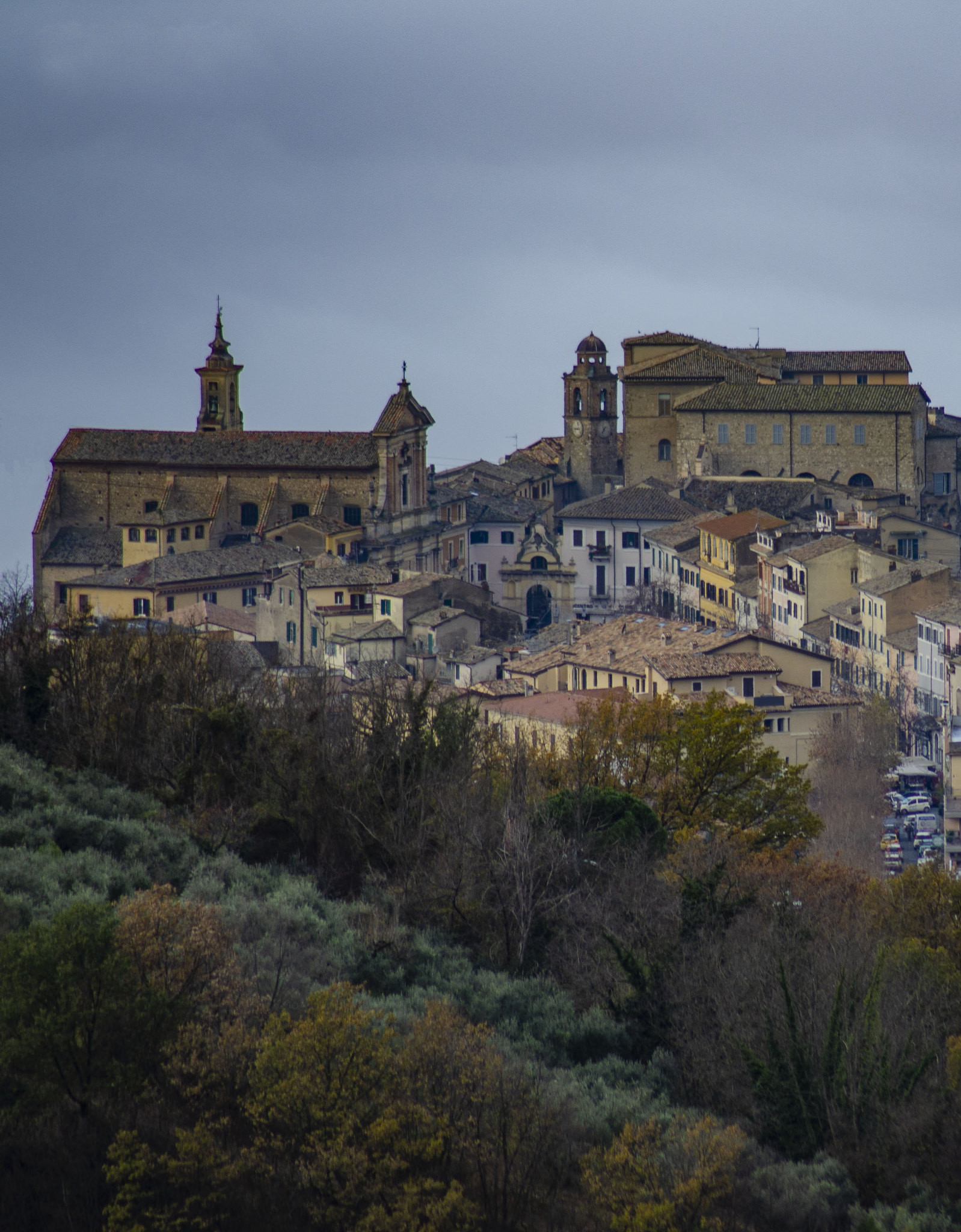 oggio Mirteto - Foto Mei Fabrizio